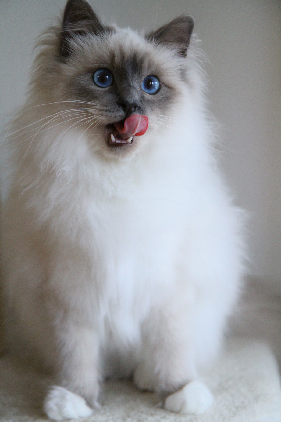 ein Heiliger Birma Zuchtkater aus der Zucht Sidi Saad's